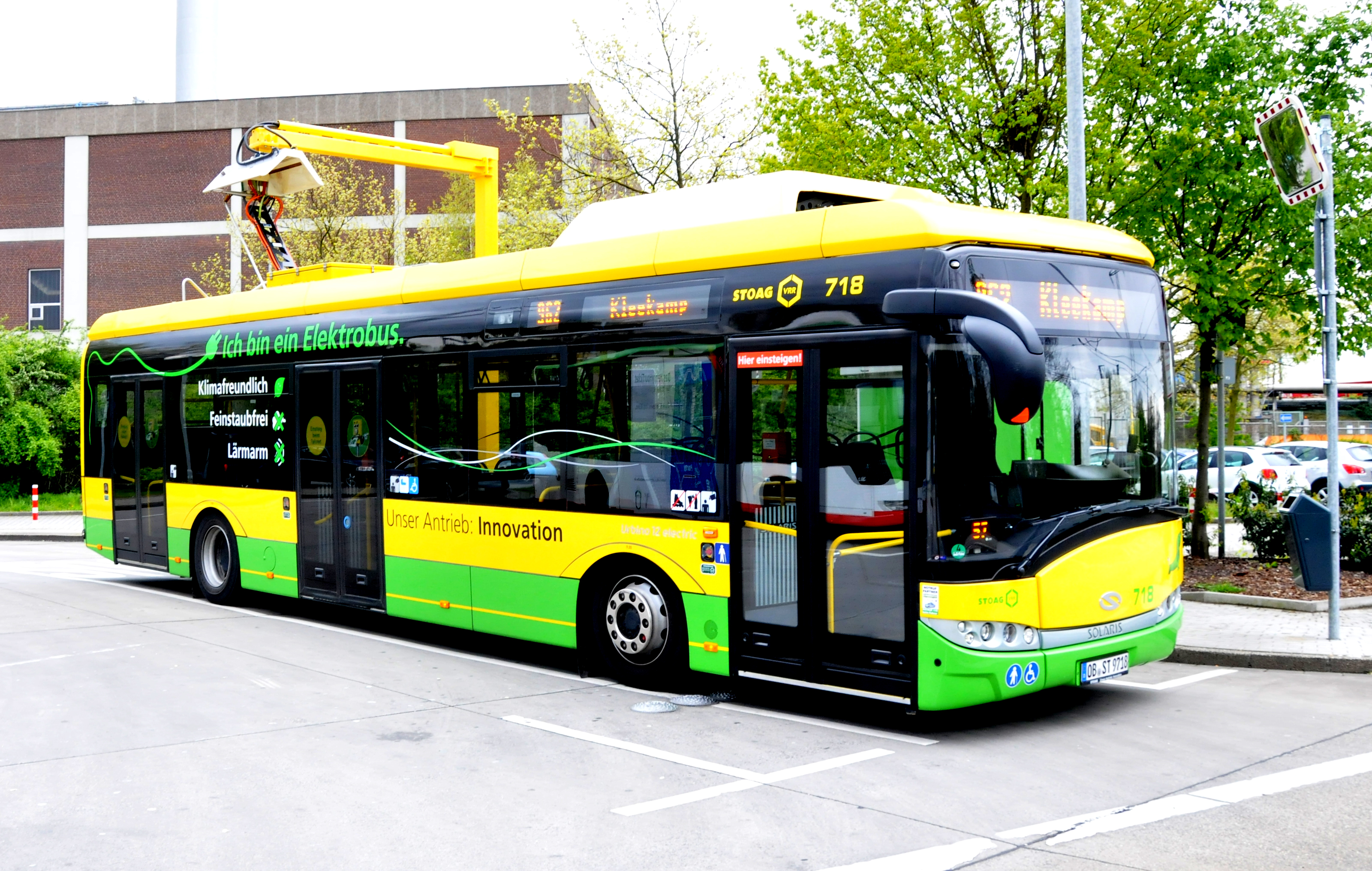 STOAG Stadtwerke Oberhausen bus 718 (bj. 2015) tijdens het bijladen op de buffer van het busstation Oberhausen-Sterkrade. Dit is een bus van het type Solaris-Urbino 12 electric die dienst doet op lijn 962 tussen Oberhausen-Sterkrade en Kleekamp vv. Ook rijden de bussen op lijn 966 van Oberhausen-Sterkrade naar Oberhausen Hauptbahnhof vv.